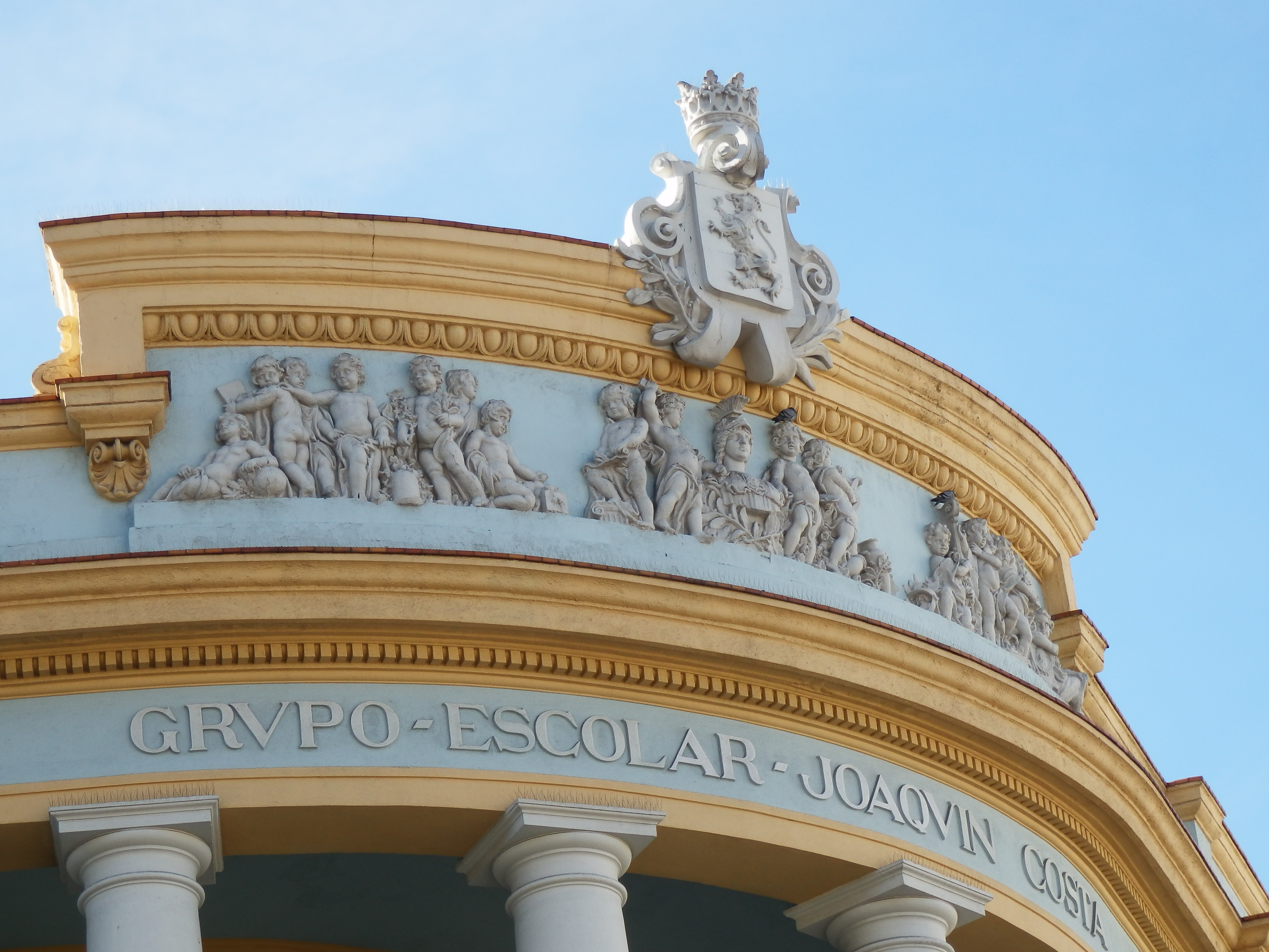 Grupo Escolar Joaquín Costa en la calle General Mayandía de Zaragoza.